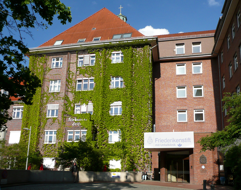 Friederikenstift Hannover